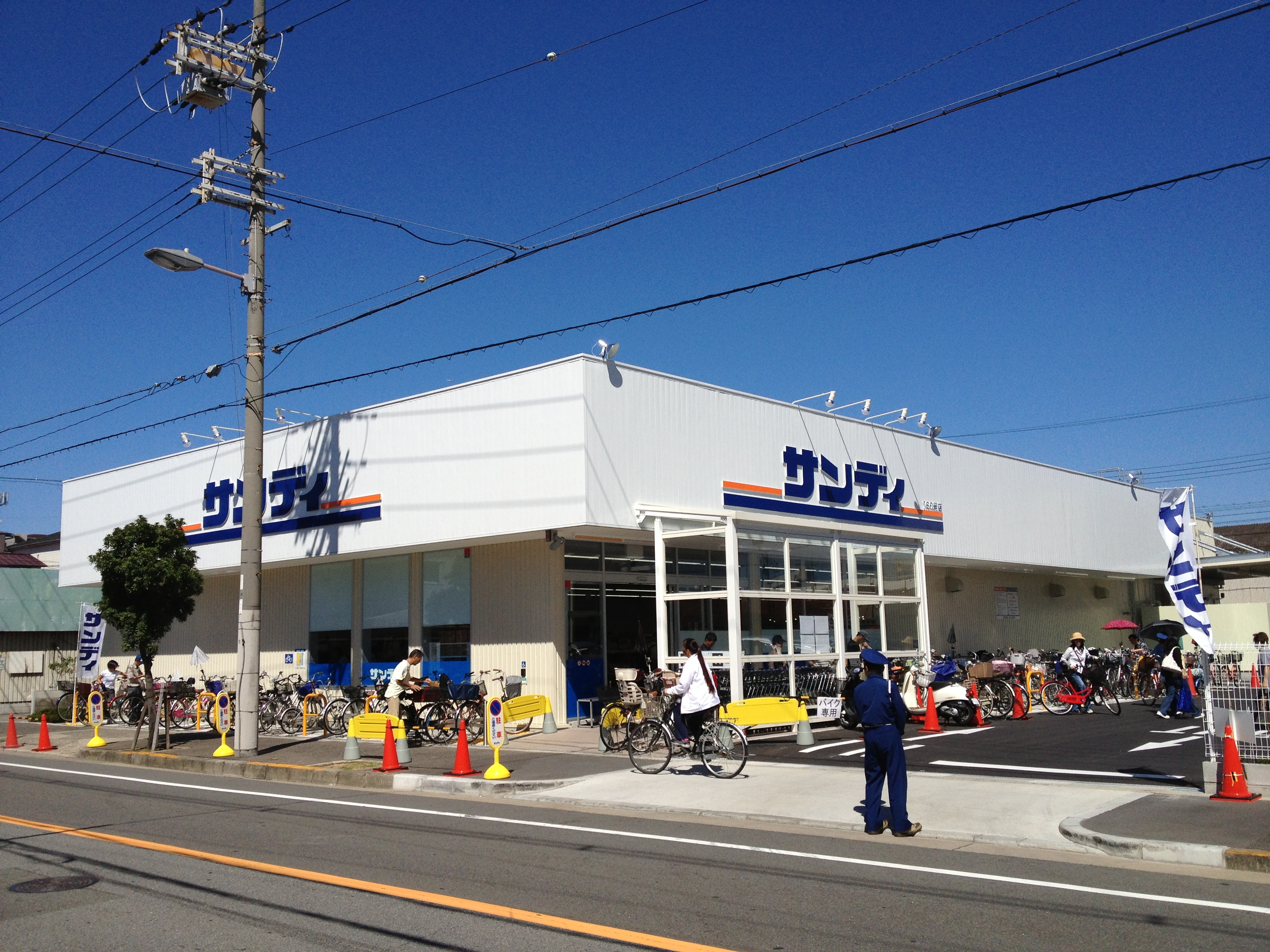 サンディ 長居公園南店（大阪府大阪市）